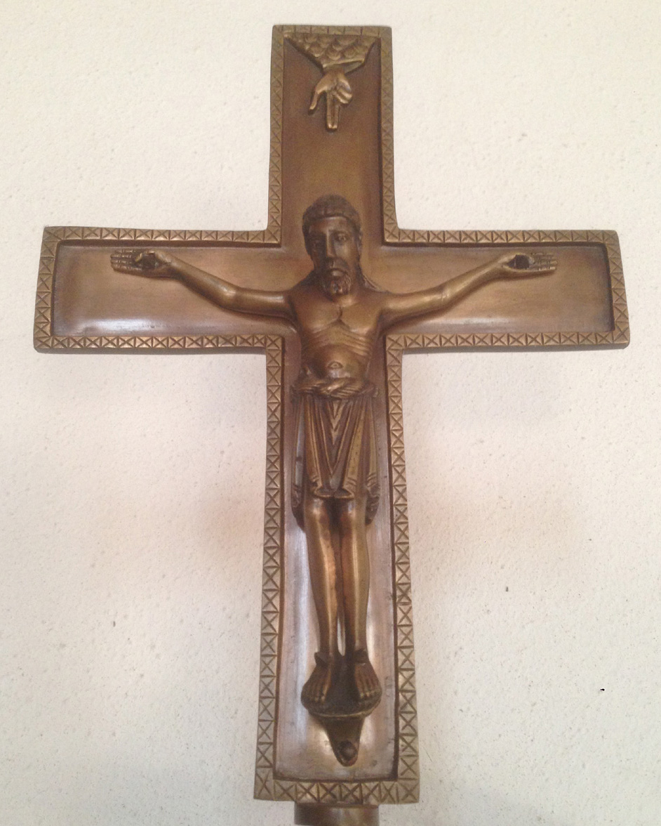 Romanisches Vortrage- oder Altarkreuz in der Alten Marienkirche in Süßen aus dem 12. Jahrhundert (originalgetreues Replikat)